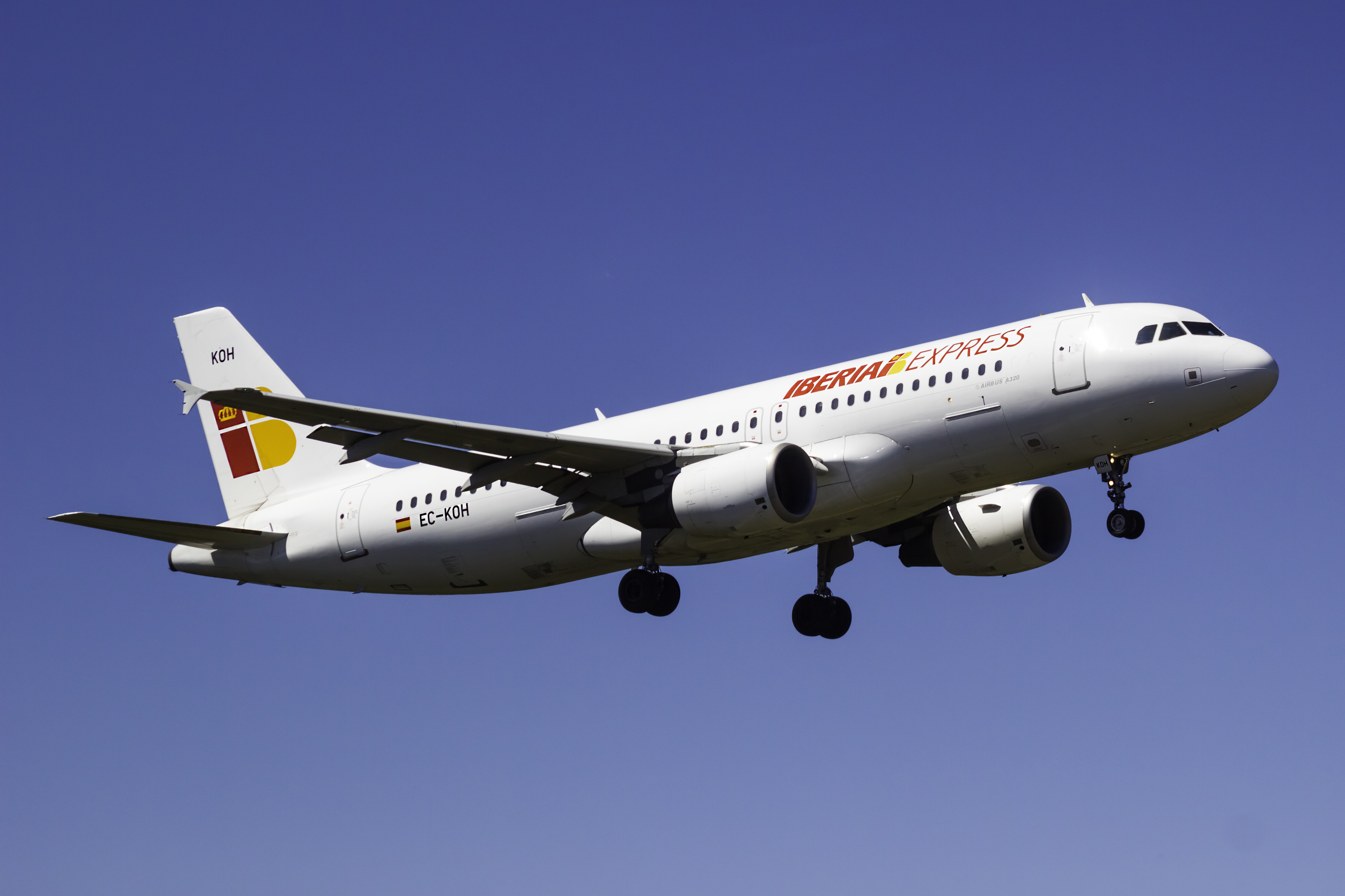 Airbus A320 de Iberia Express aterrando no aeroporto de Santiago de Compostela.